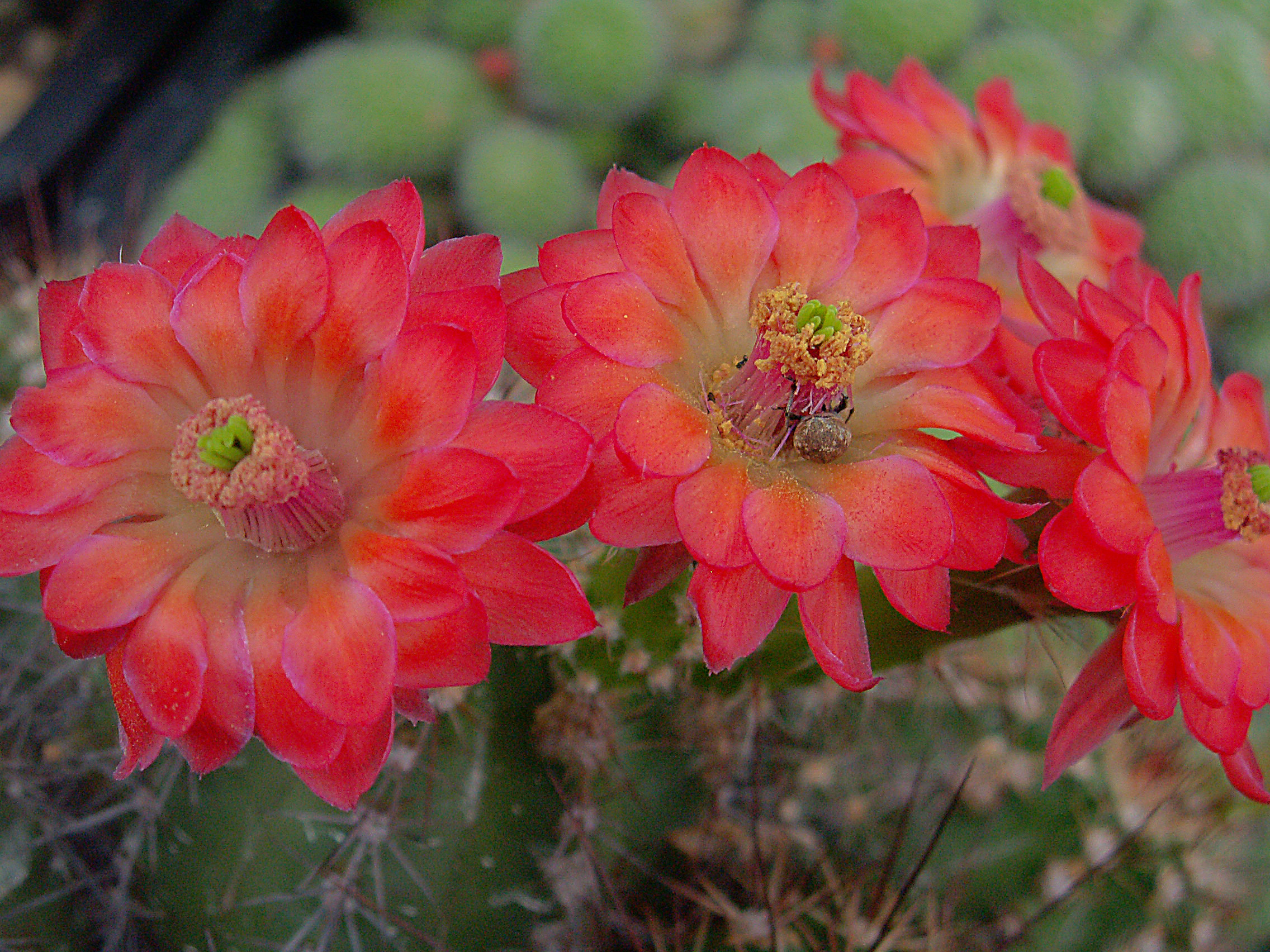 Echinocereus fendleri var. robustus (Peebles) L.D.Benson